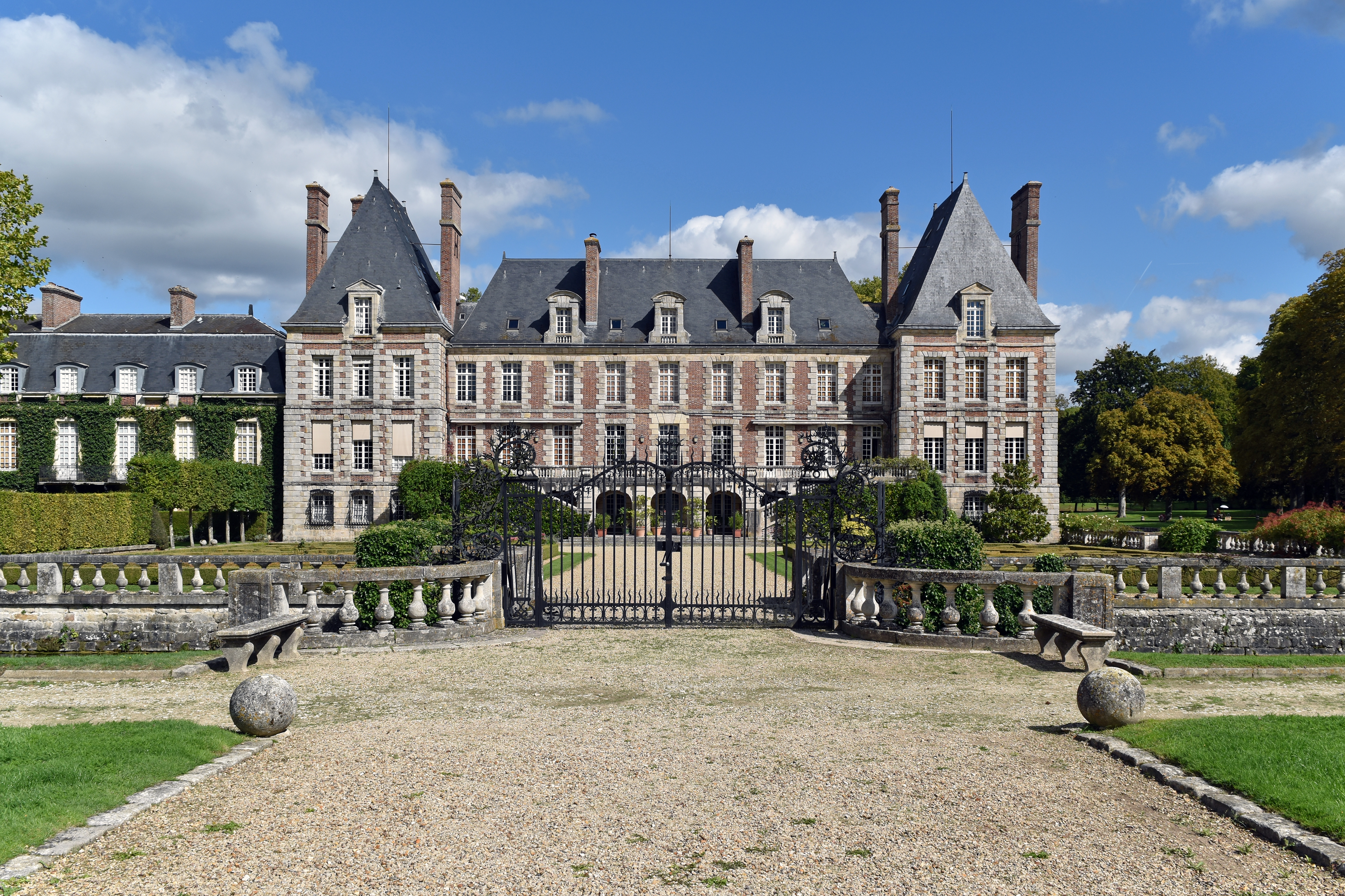 Château de Courances, Essonne, France .